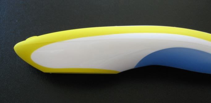 Boarisch: Zahnbürstengriff in Mehrkomponententechnik